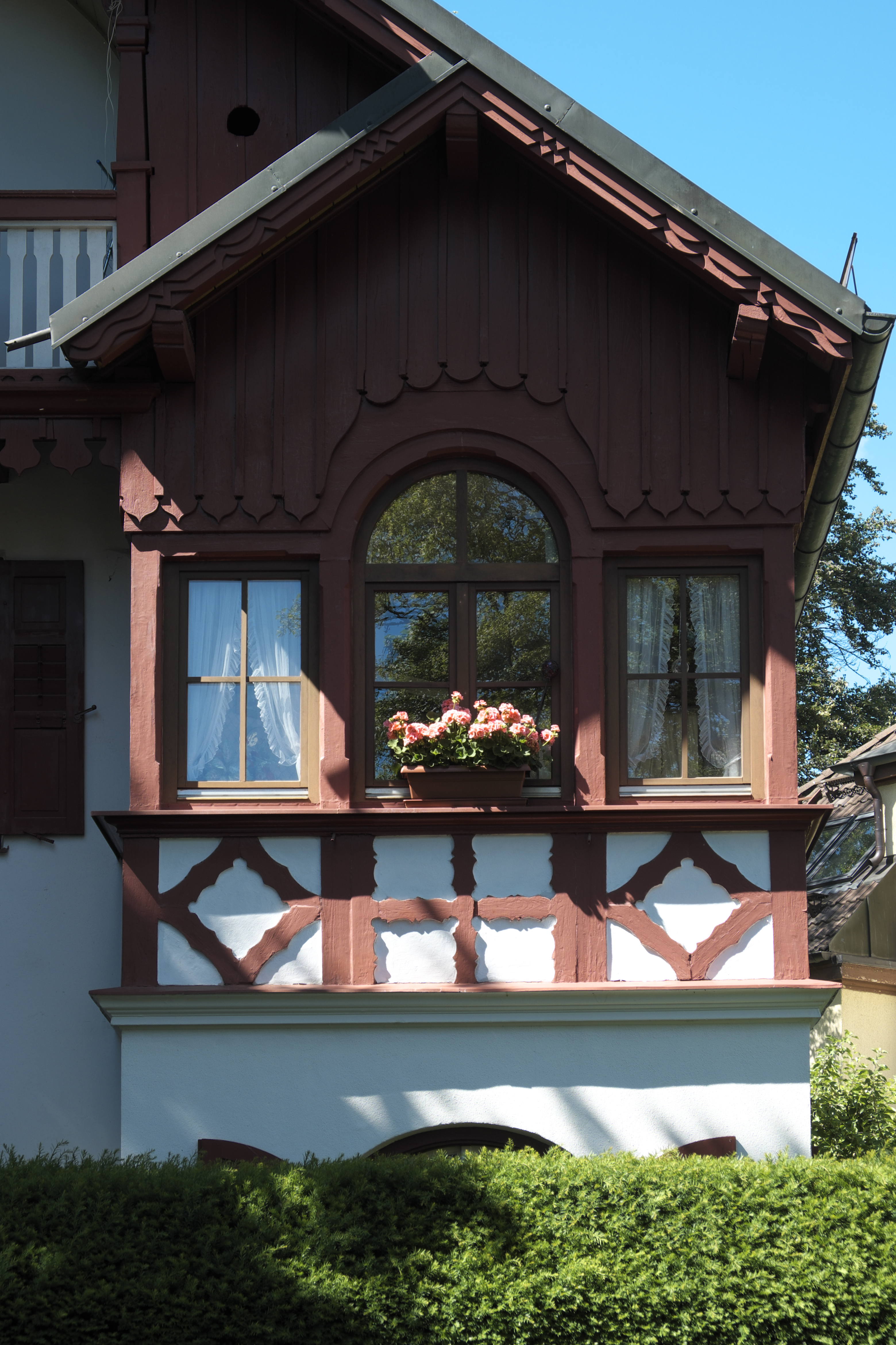 Villa in der Apfelallee 2 in Obermenzing im Stadtbezirk Pasing-Obermenzing in München (Bayern/Deutschland)